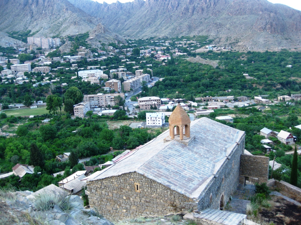 Մեղրու Փոքր թաղի Ս. Հովհաննես Մկրտիչ եկեղեցու ընդնաւոր տեսքը